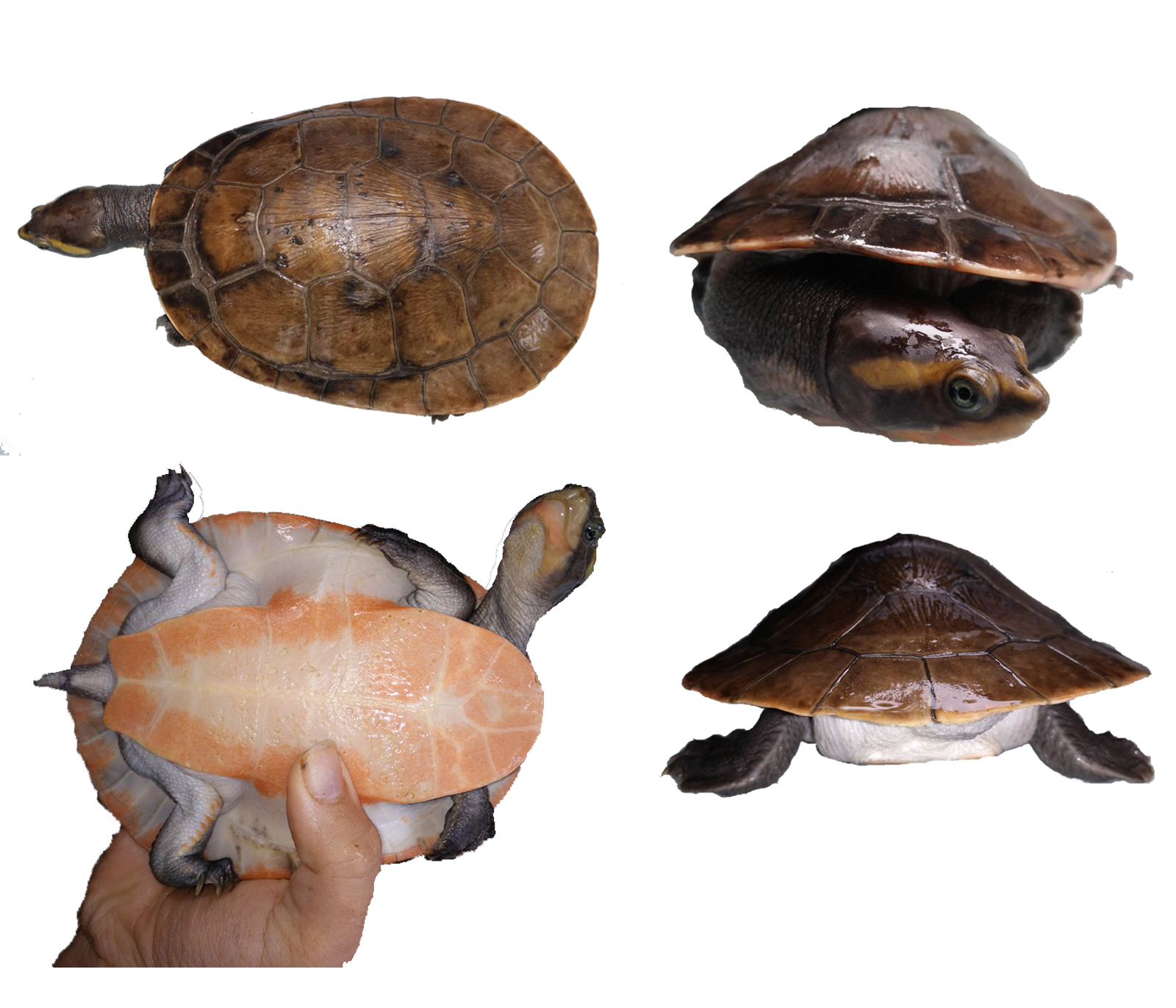 Emydura subglobosa Description views